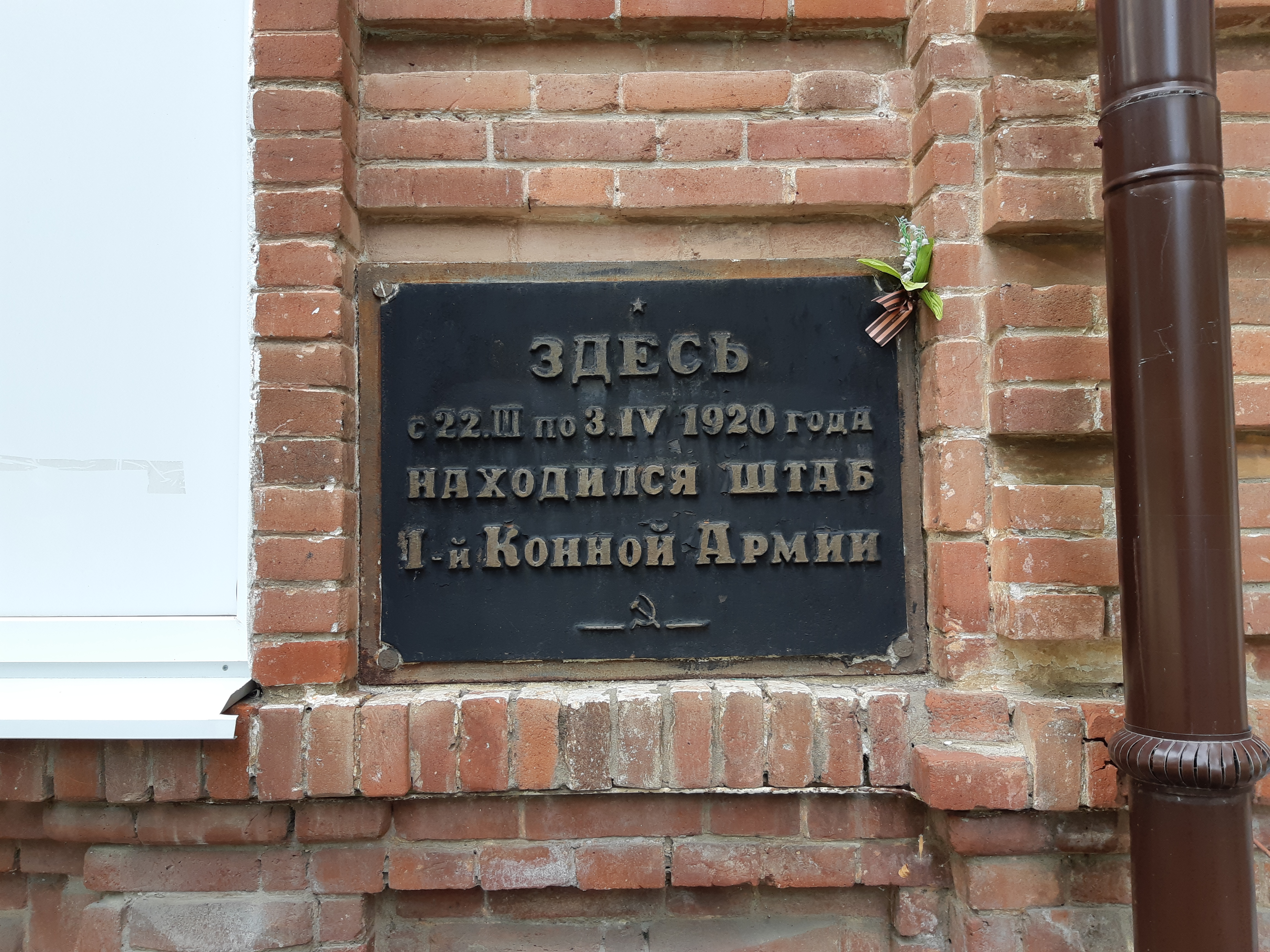 Здание, где располагался штаб 1-й конной армии: улица Комсомольская, 212, Майкоп, Адыгея